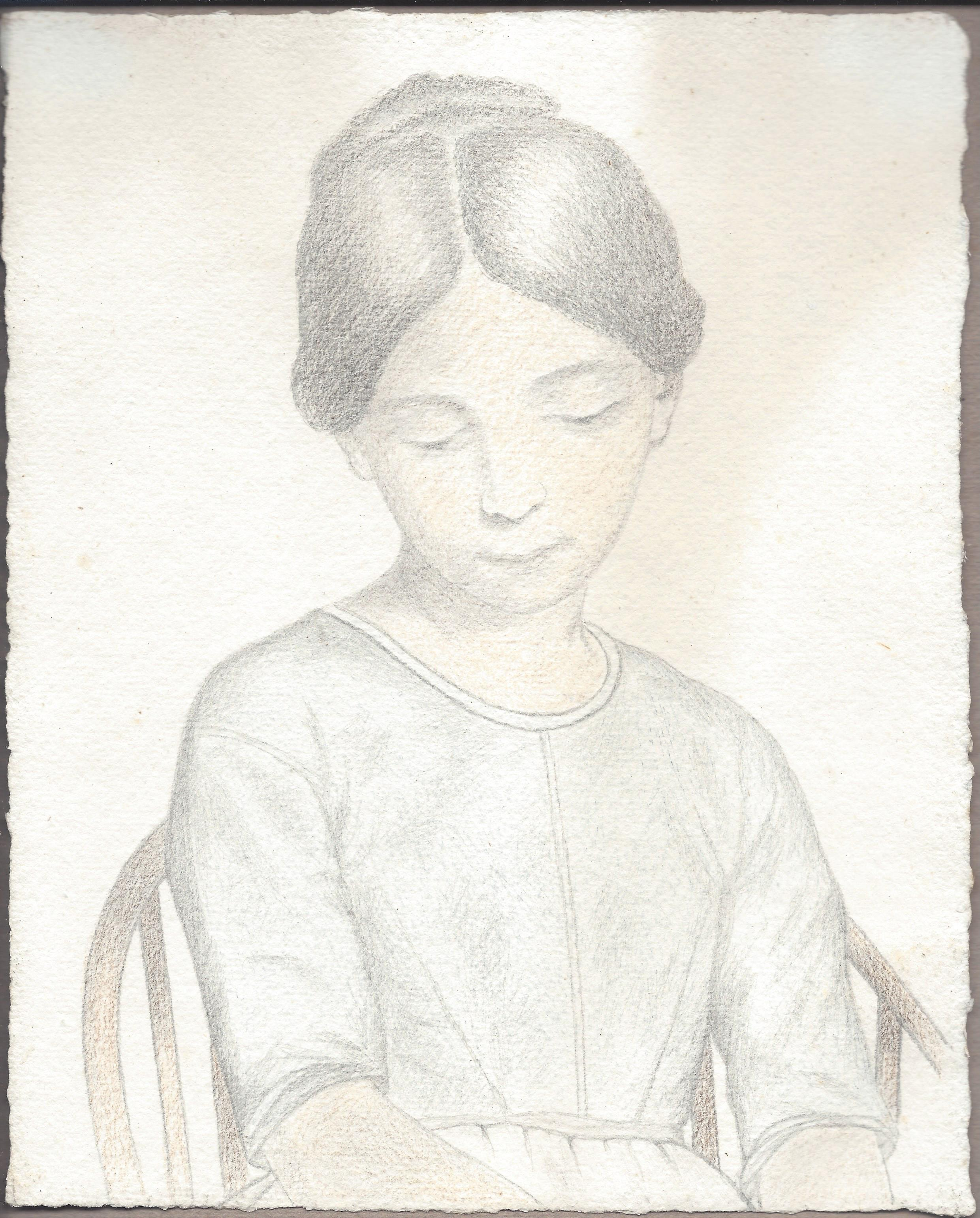 Mathias Barz: Buntstiftzeichnung der Schauspielerin Hilde Bart geb. Brunhilde Stein (1896-1967), rückseitig signiert und datiert Barz 6.37. Provenienz und Rahmung: Kunsthandel en Encadrementen Hub. Dejong-Bergers, Maastricht.